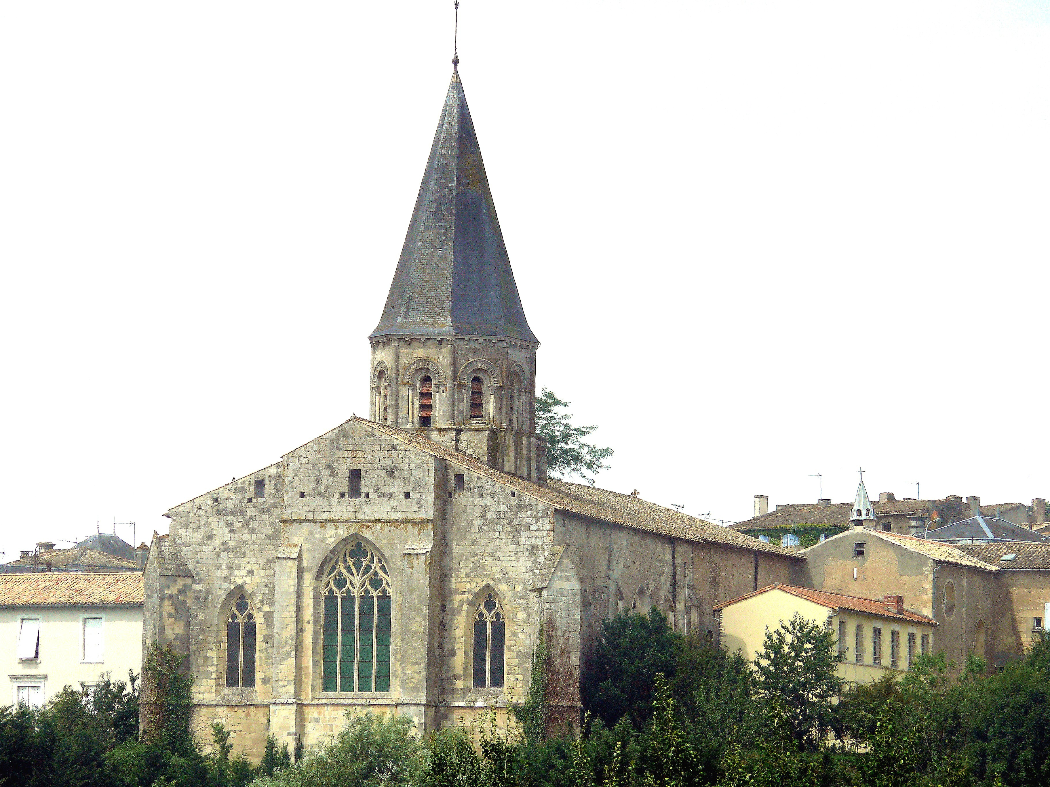 Champdeniers-Saint-Denis - Eglise Notre-Dame - Chevet